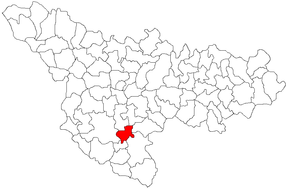 Categorie:Hărţi ale judeţului Timiş